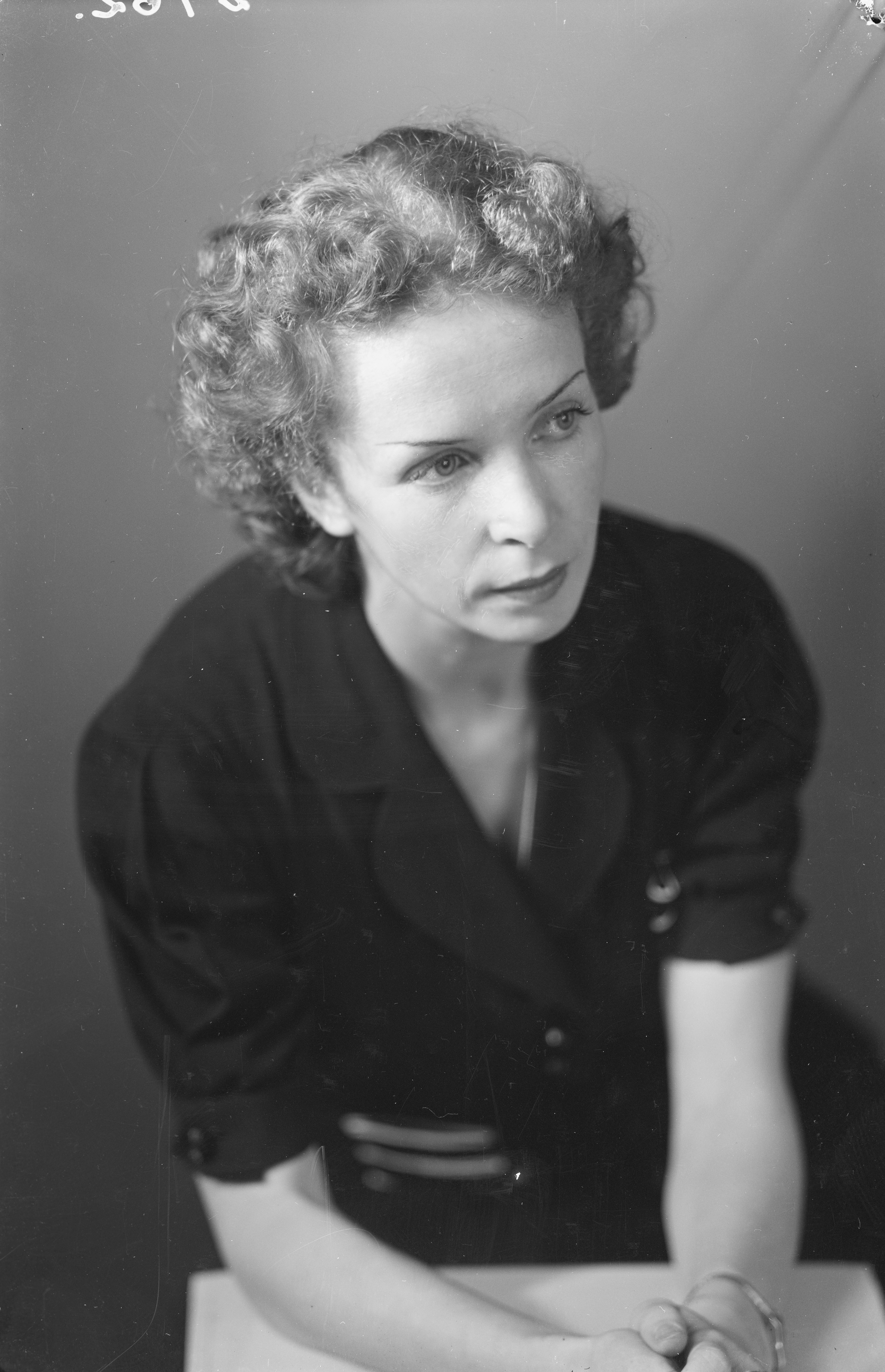 näyttelijätär Sylvi Palo; pysty, mustavalkoinen